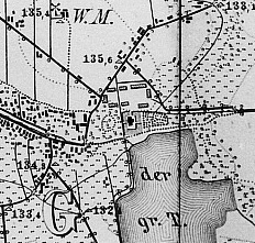 Schloss Wiednitz, Meßtischblatt, 1-25.000, 1883